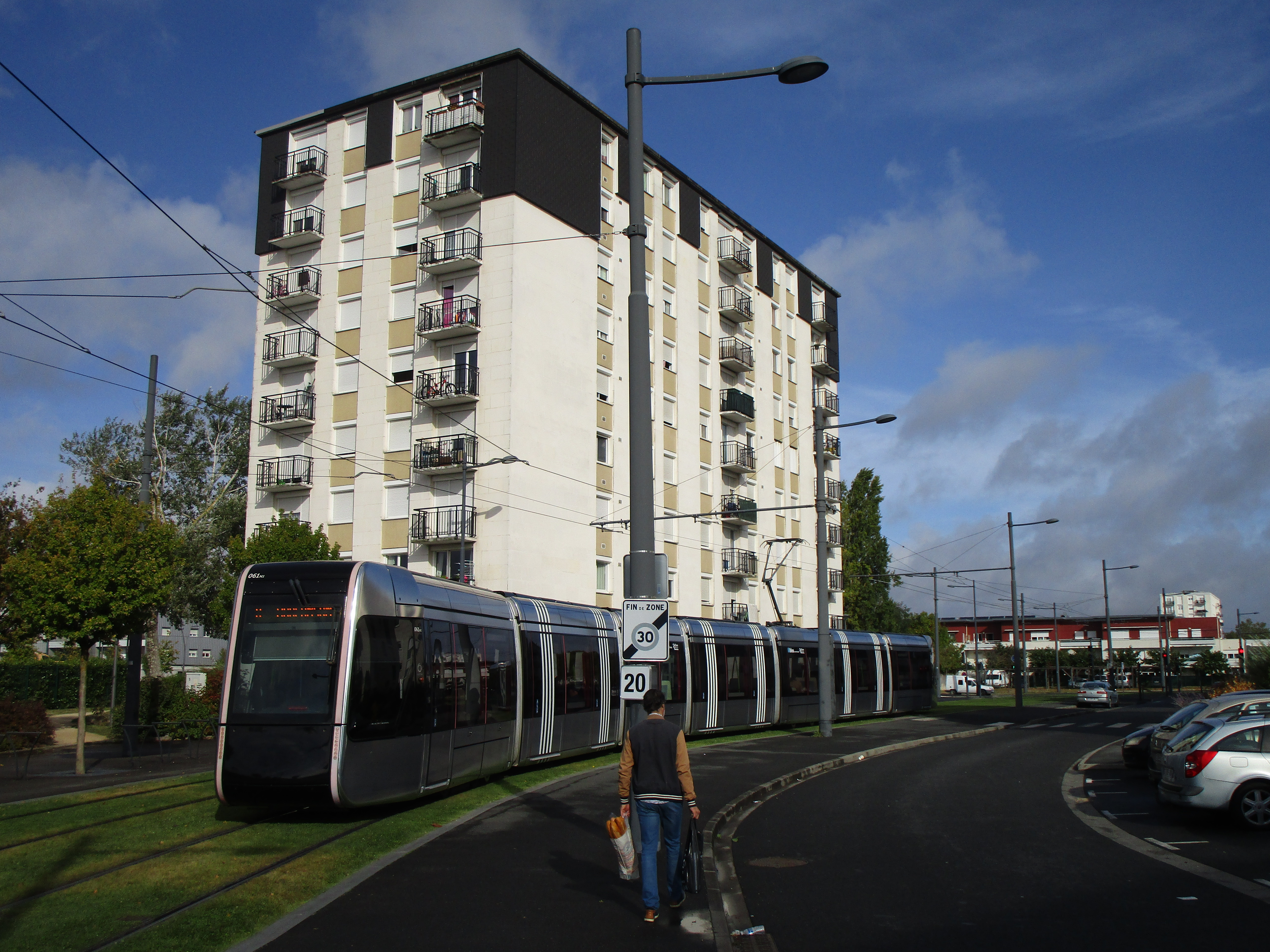 La tour Pradier dans le quartier de La Rabière, commune de Joué-lès-Tours.